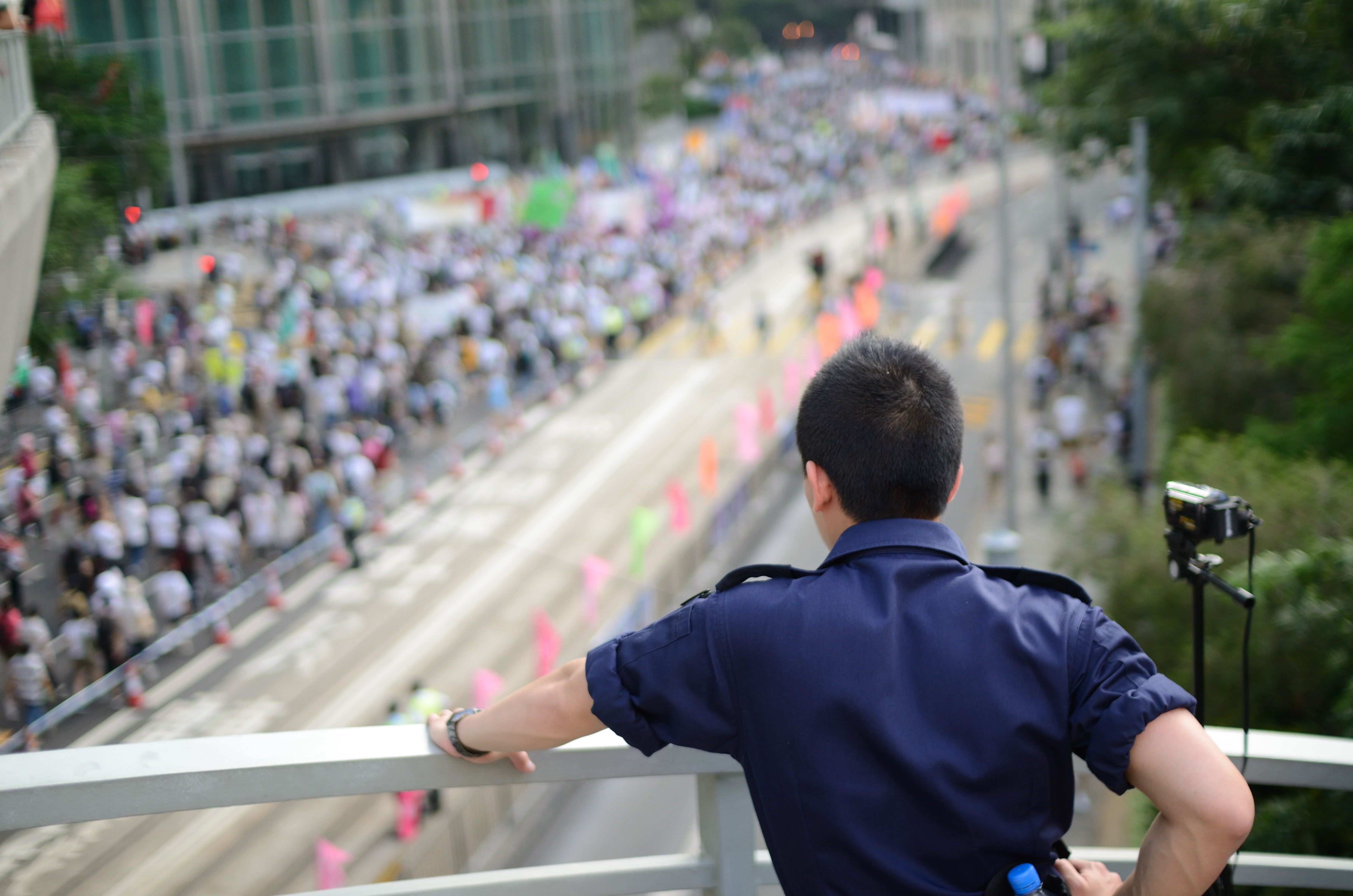 2011 Hong Kong July 1 march